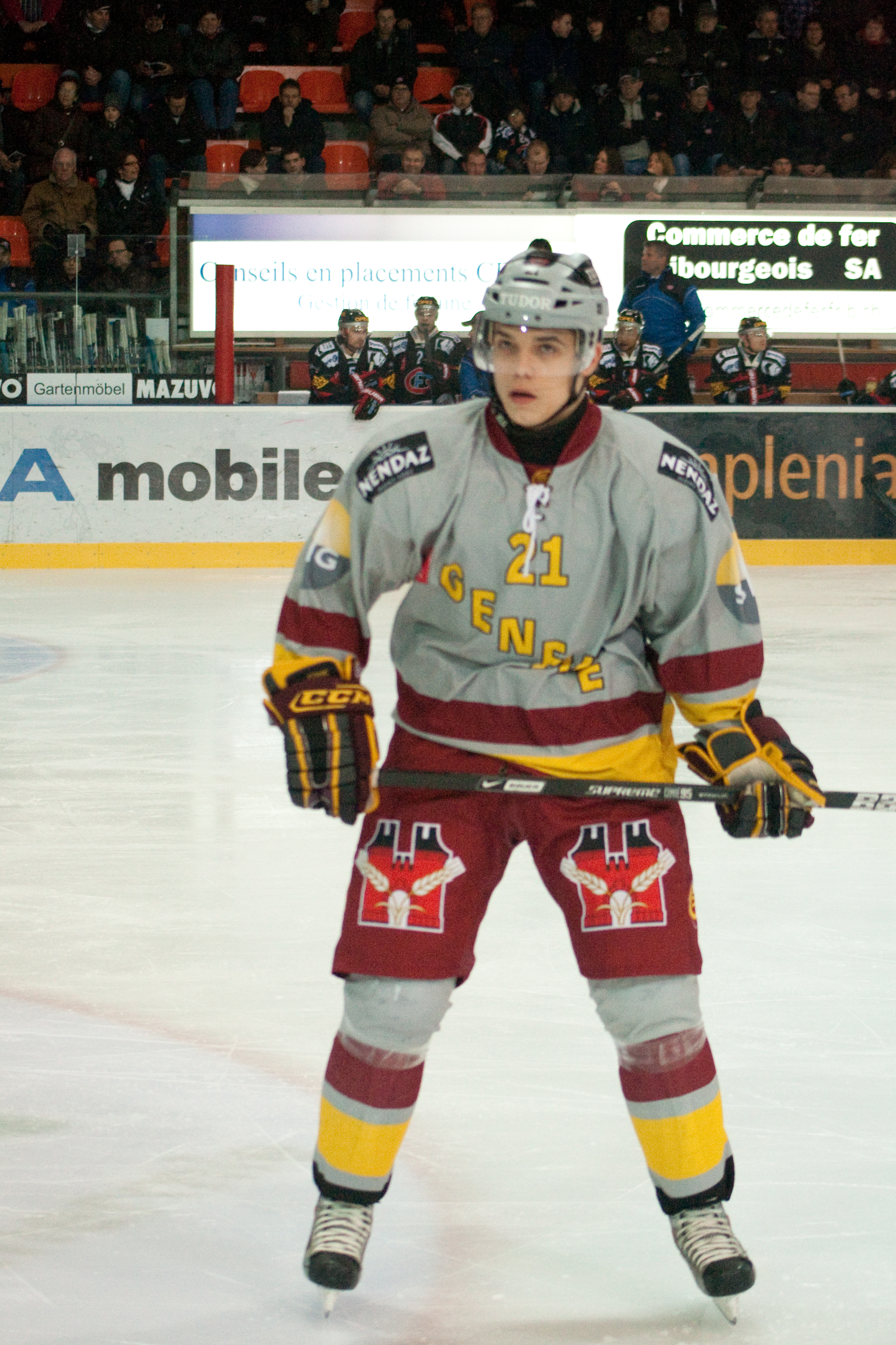 Suri Reto du Genève Servette Hockey Club